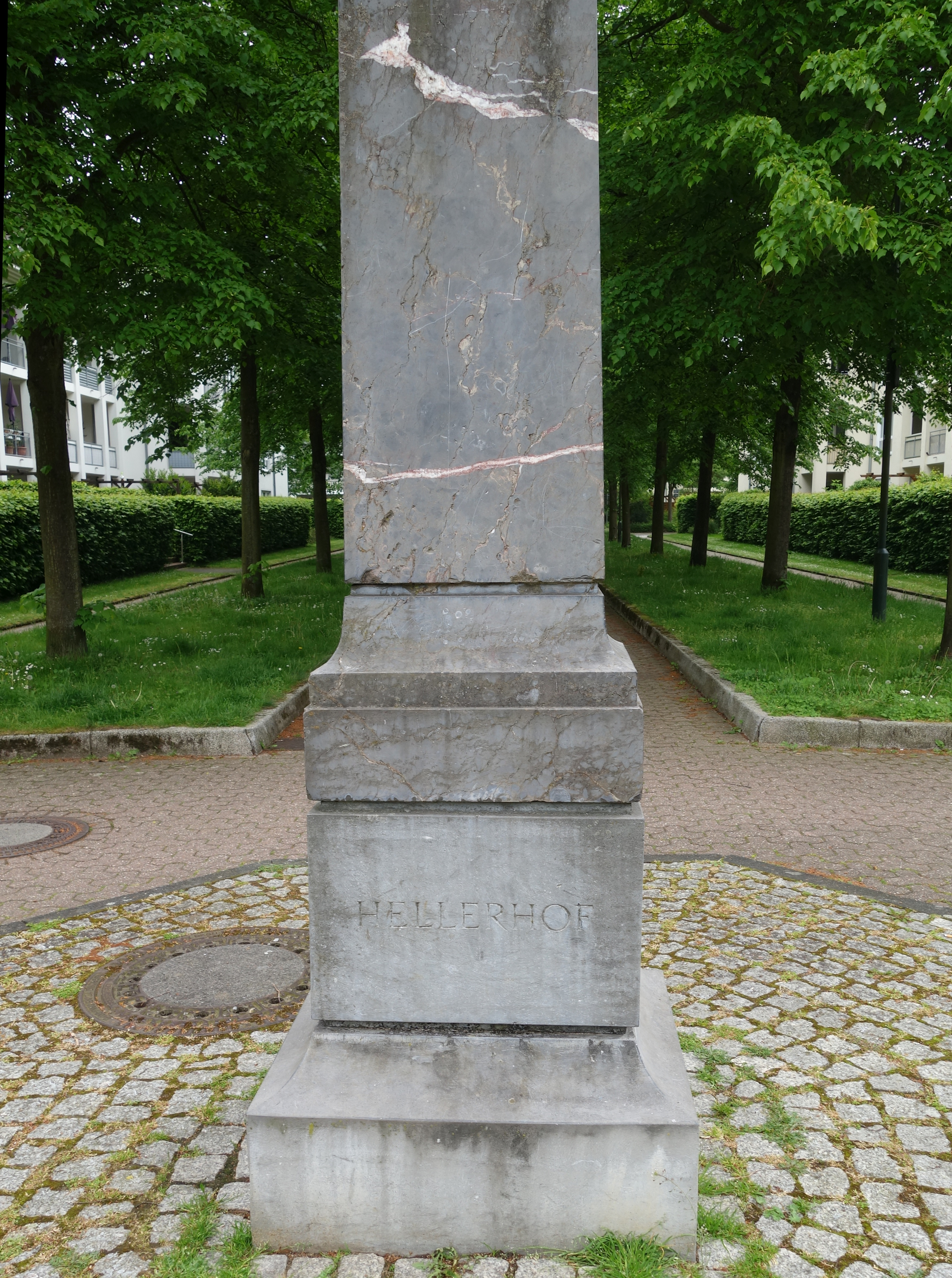 Säule Garath - Hellerhof, Düsseldorf 2019.